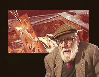 Portrait de Jean Bertholle